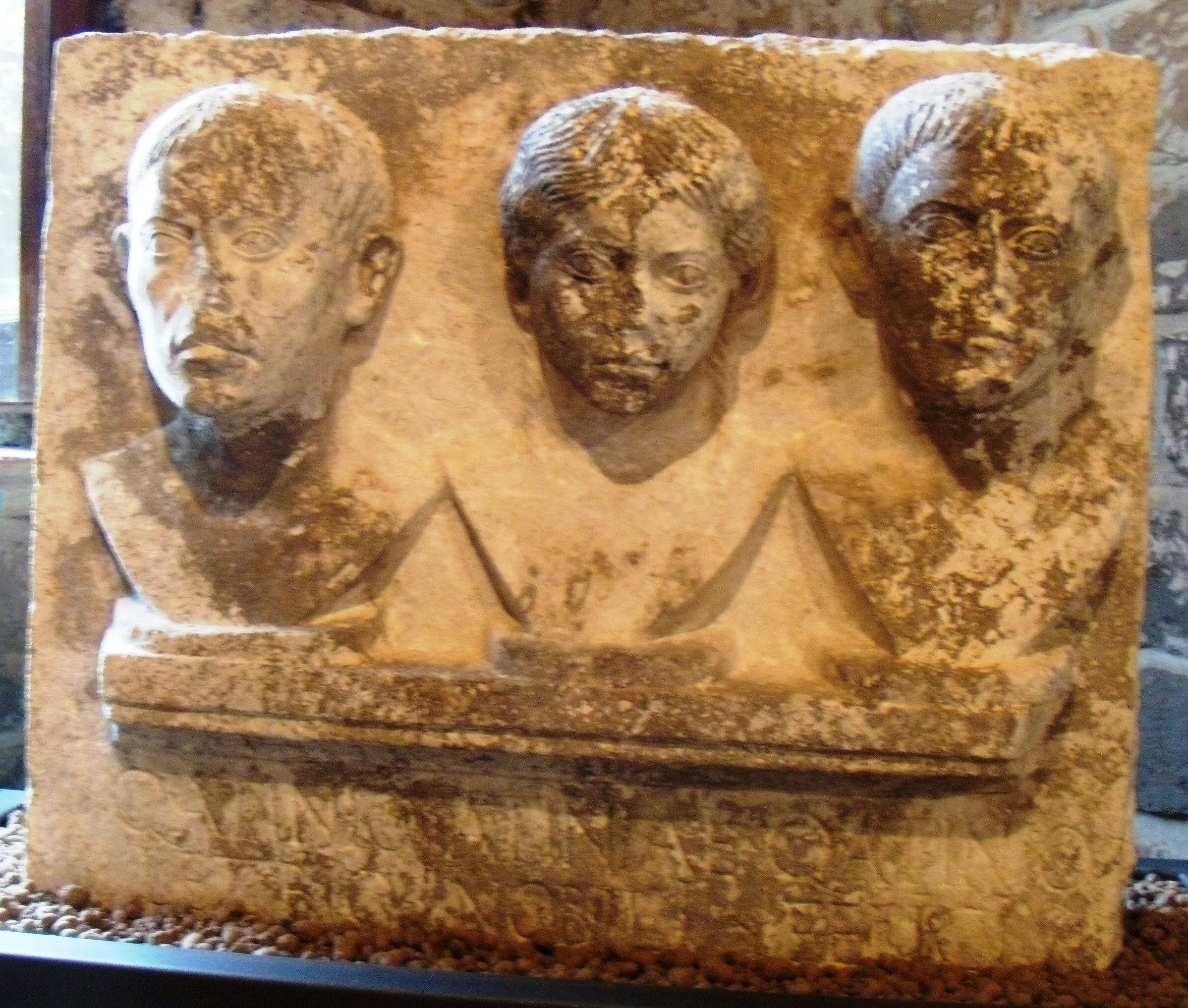 Monumento funerario romano trovato negli scavi archeologici di Telesia. Antiquarium di Telesia presso l'Abbazia benedettina del Santissimo Salvatore in San Salvatore Telesino, provincia di Benevento.